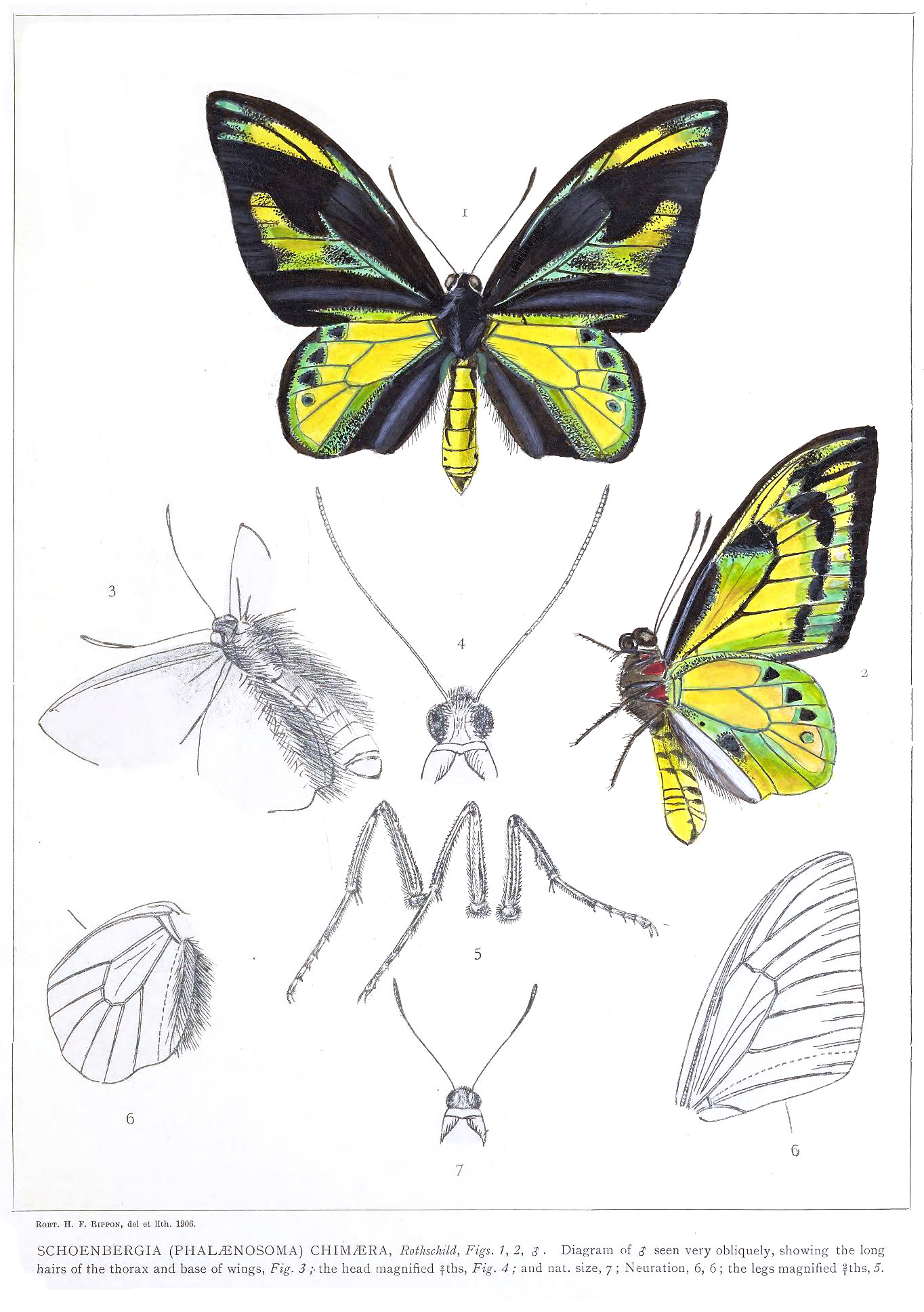 Schoenbergia chimaera